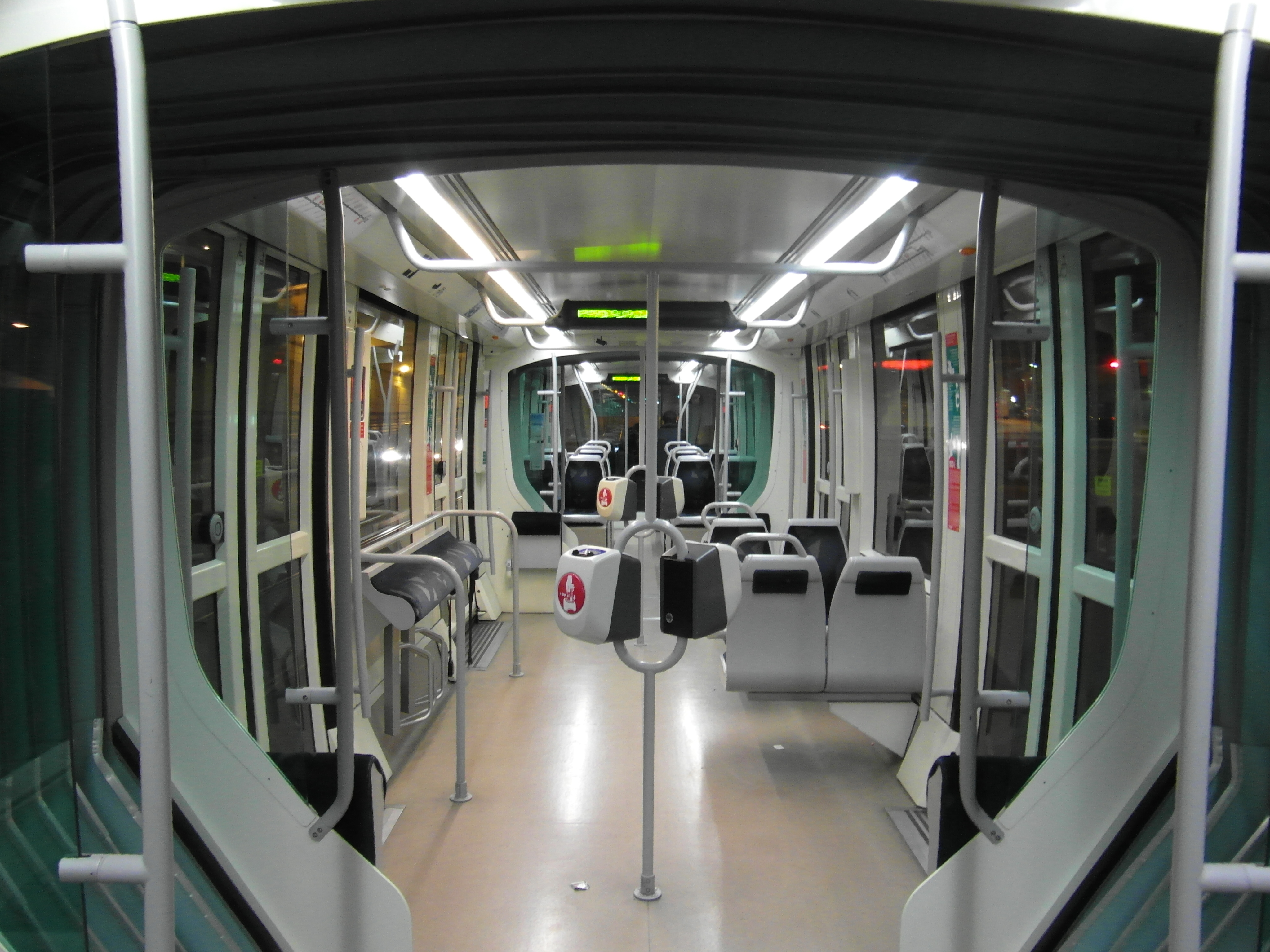 Barcelona - Inside Tram - Trambesòs